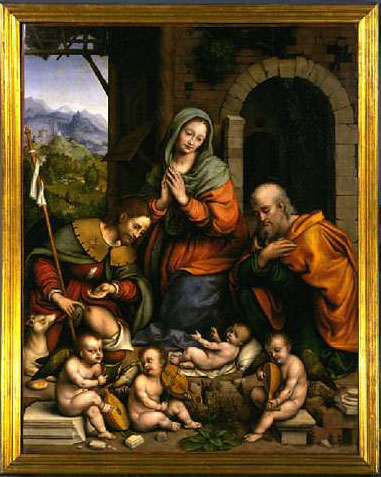 Adoration du Christ avec saint Rocm